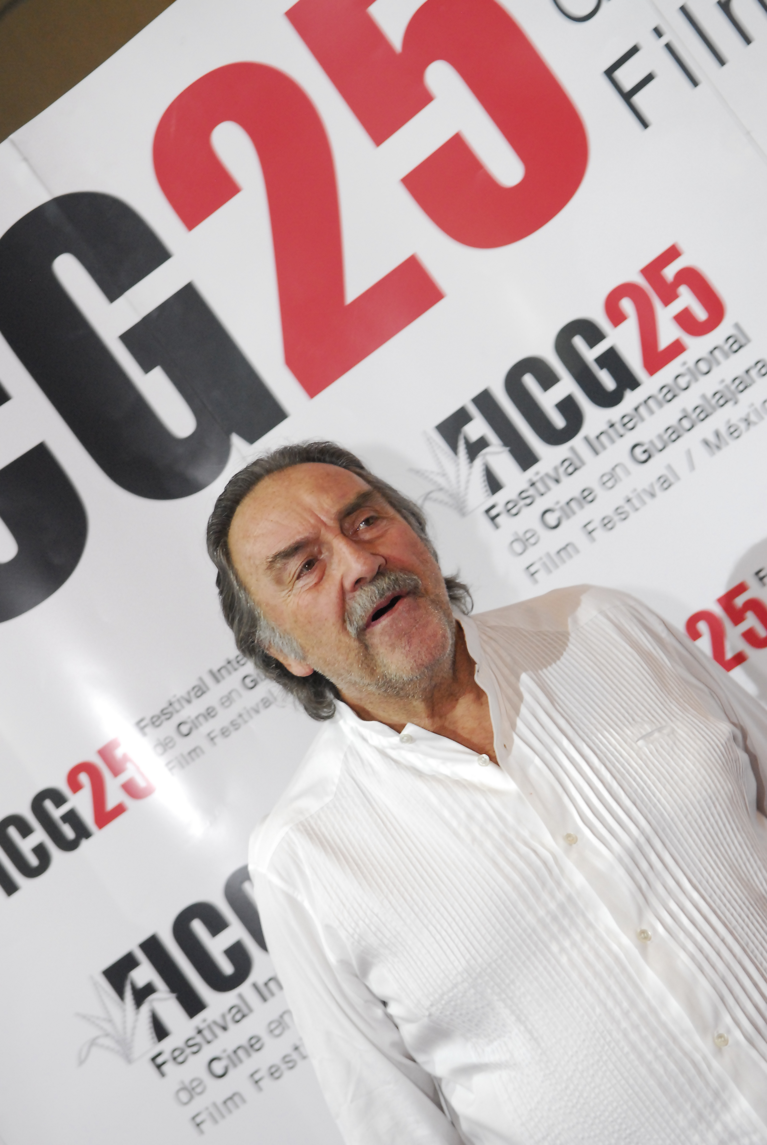 Pedro Armendariz-Gala de beneficencia Mother & child Director Rodrígo García-17_03_10-©cortesía de FICG 25_Oscar Delgado (9)